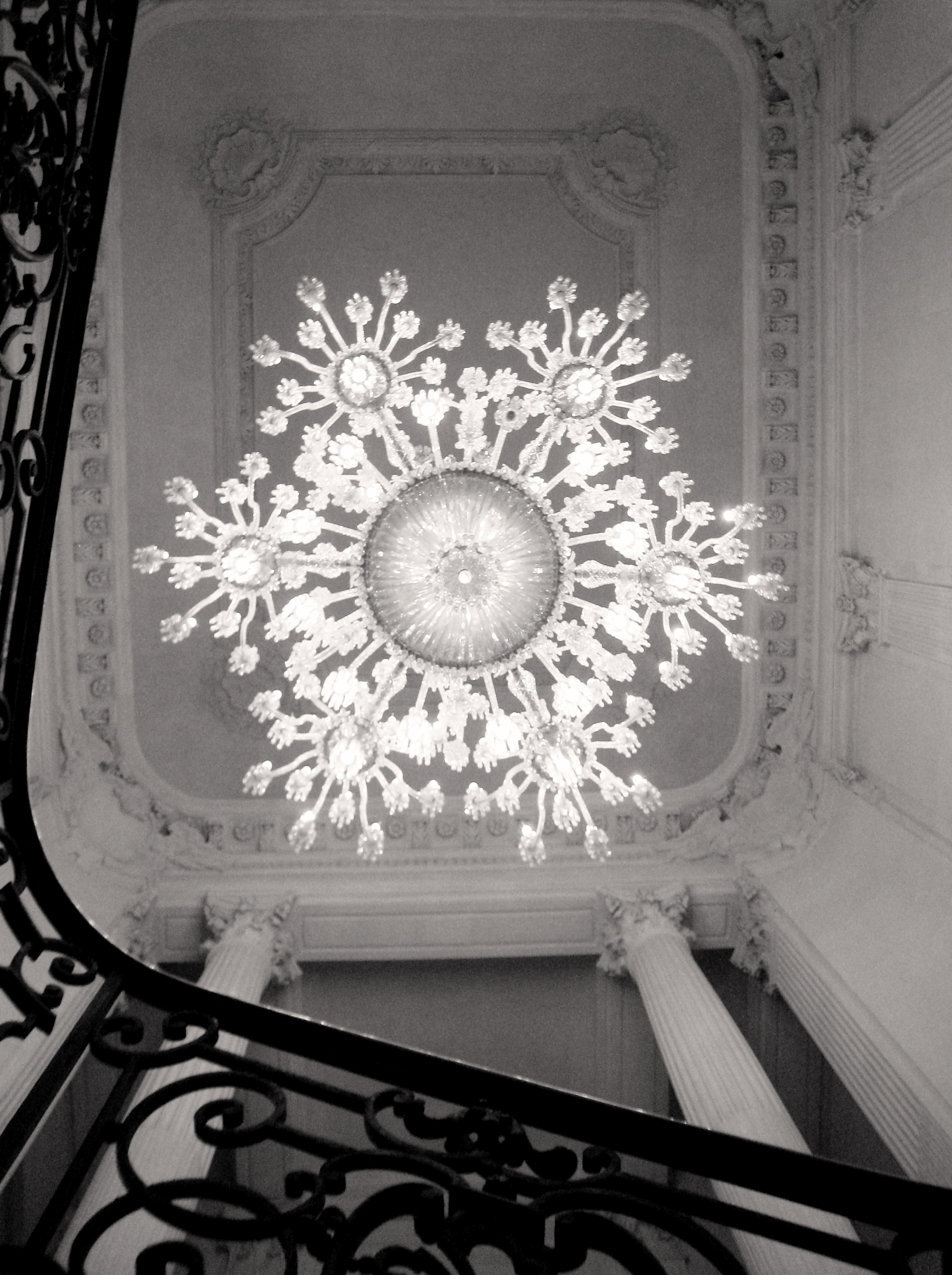 Lustre de l'escalier du musée Baccarat, Paris, France